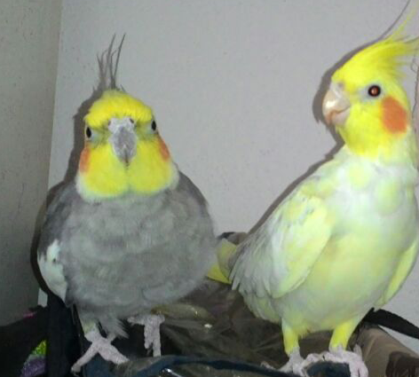 My cockatiels, male (left) and female (right)